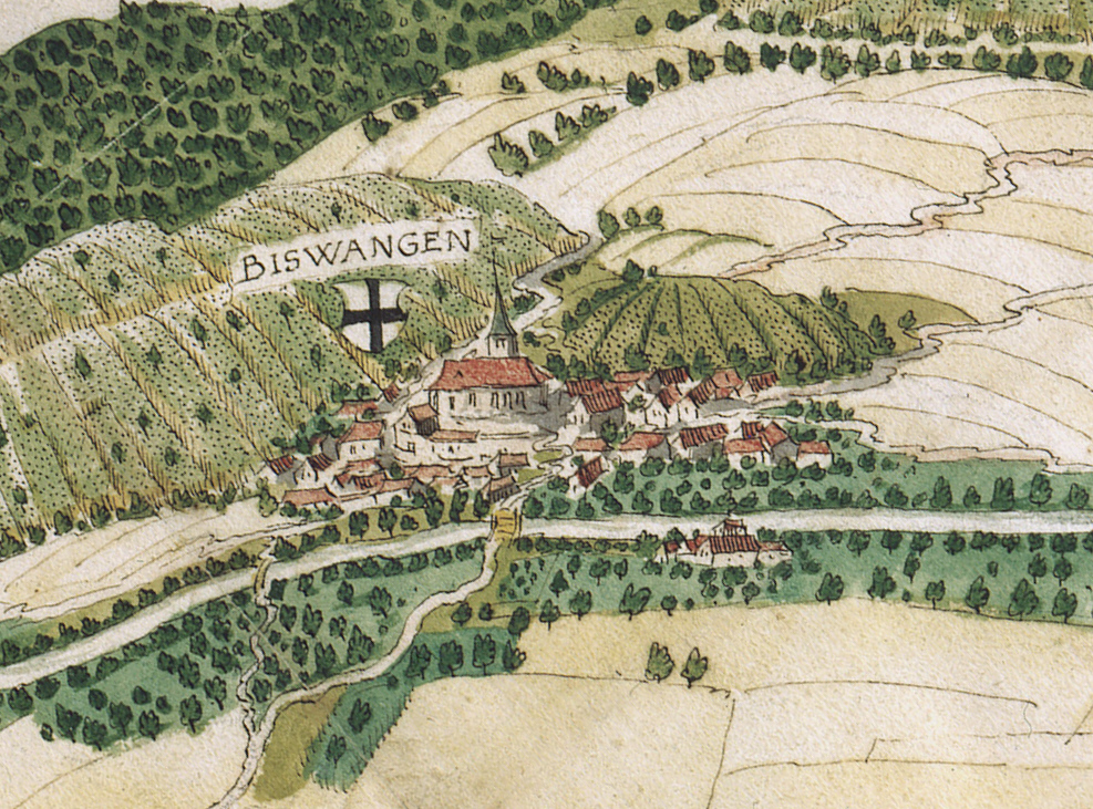 Territorium der Reichsstadt Heilbronn von Hans Peter Eberlin, 1578 (HStAS C 3 Bü 4290), Detail: Binswangen